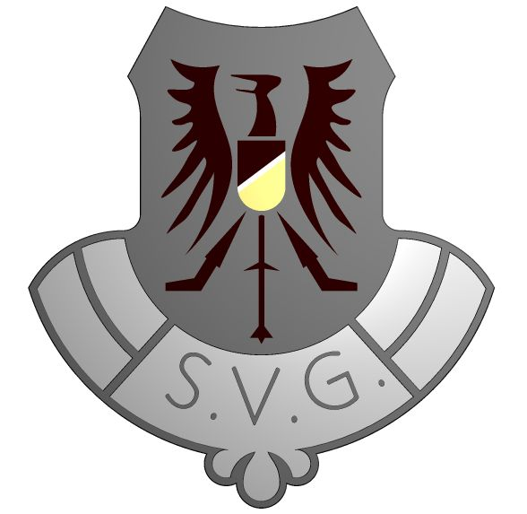 Vereinswappen FC Germania 1916 Wernigerode